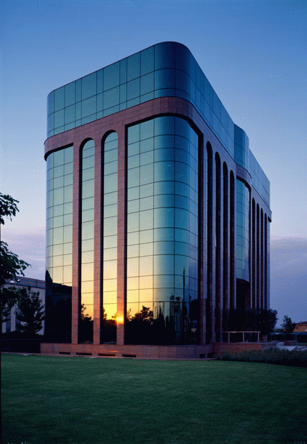 Штаб-квартира Ferroli S.p.A. в г. Сан-Бонифачо, Италия